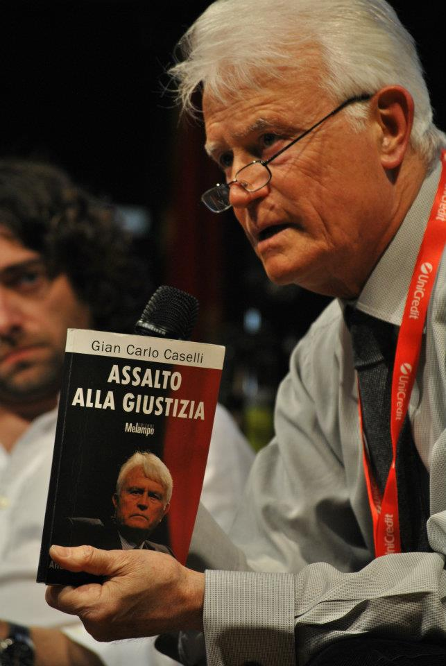 Gian Carlo Caselli al Festival Internazionale del Giornalismo.